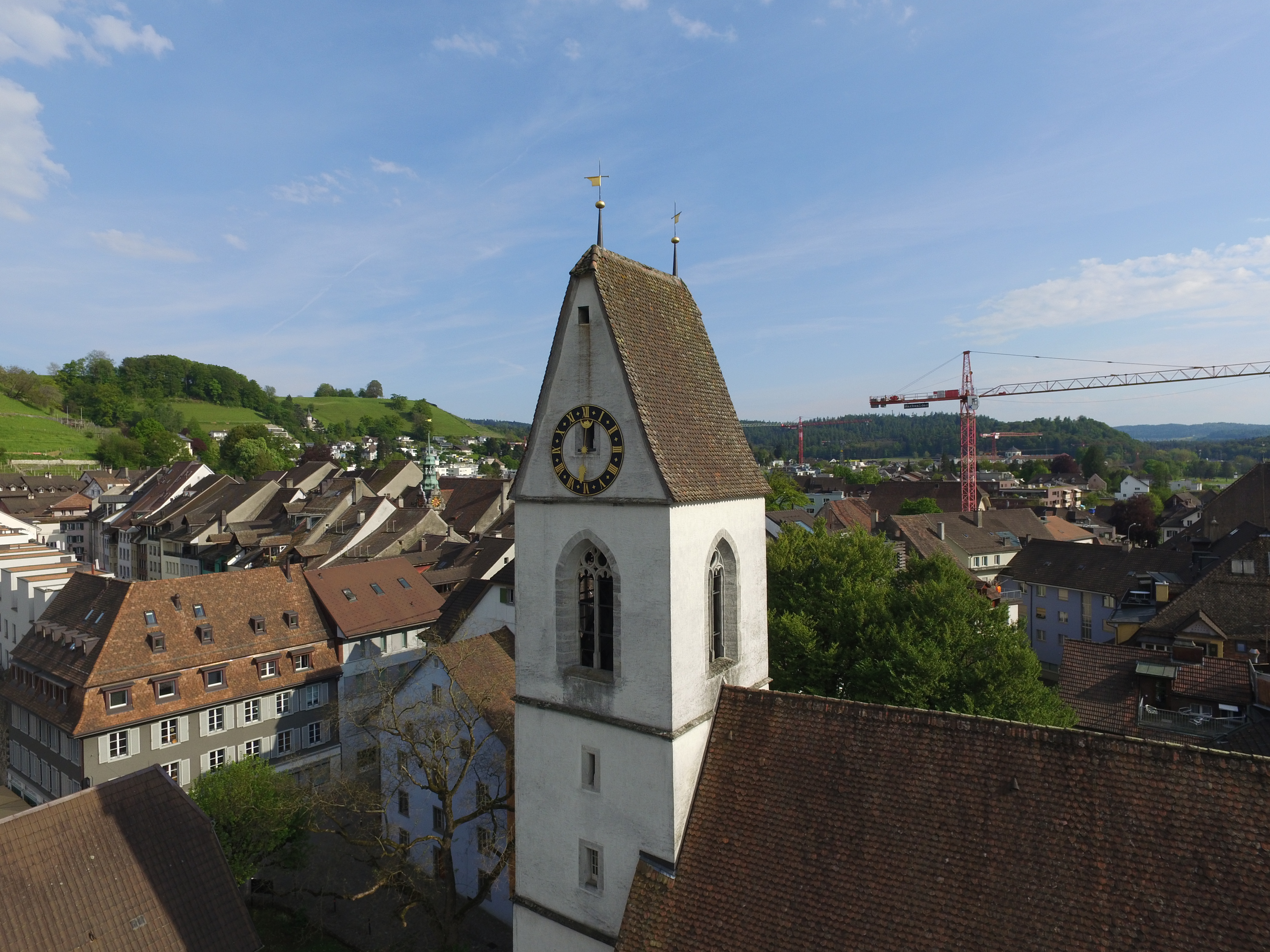 Lenzburg